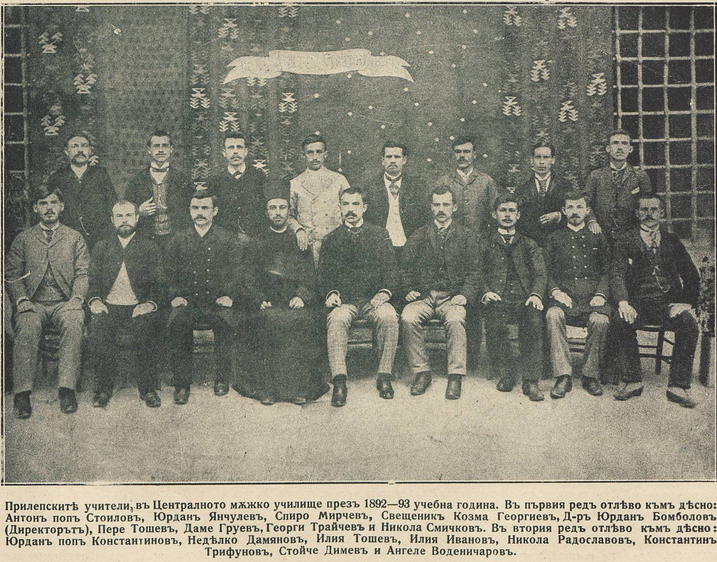 Bulgarian exarchist school teachers from Prilep (1892-1893), Pere Toshev in the middle Български екзархистки учители от Прилеп: (долу; ляво-дясно) Антон Поп Стоилов, Юрдан Янчулев, Спиро Мирчев, Козма Георгиев, д-р Юрдан Бомболов (директор), Пере Тошев, Даме Груев, Георги Трайчев и Никола Смичков. Втори ред: Юрдан Поп Константинов, Неделко Дамянов, Илия Тошев, Илия Иванов, Никола Радославов, Константин Трифонов, Стойче Димов и Ангел Воденичаров [1]